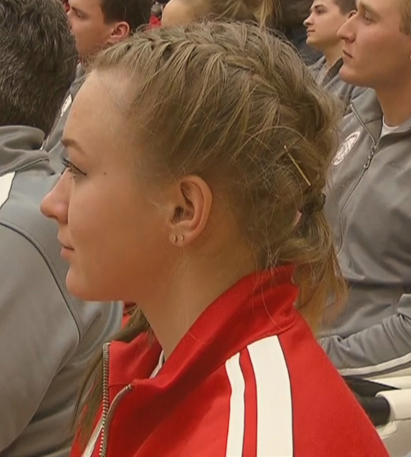 Юлия Владимировна Беломестных (род. 17 марта 1996) — российская бобслеистка.